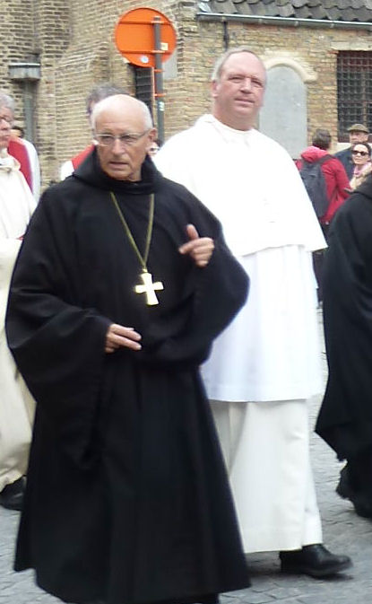 Bloedprocessie AD2014, Brugge Erik De Sutter (Grimbergen)